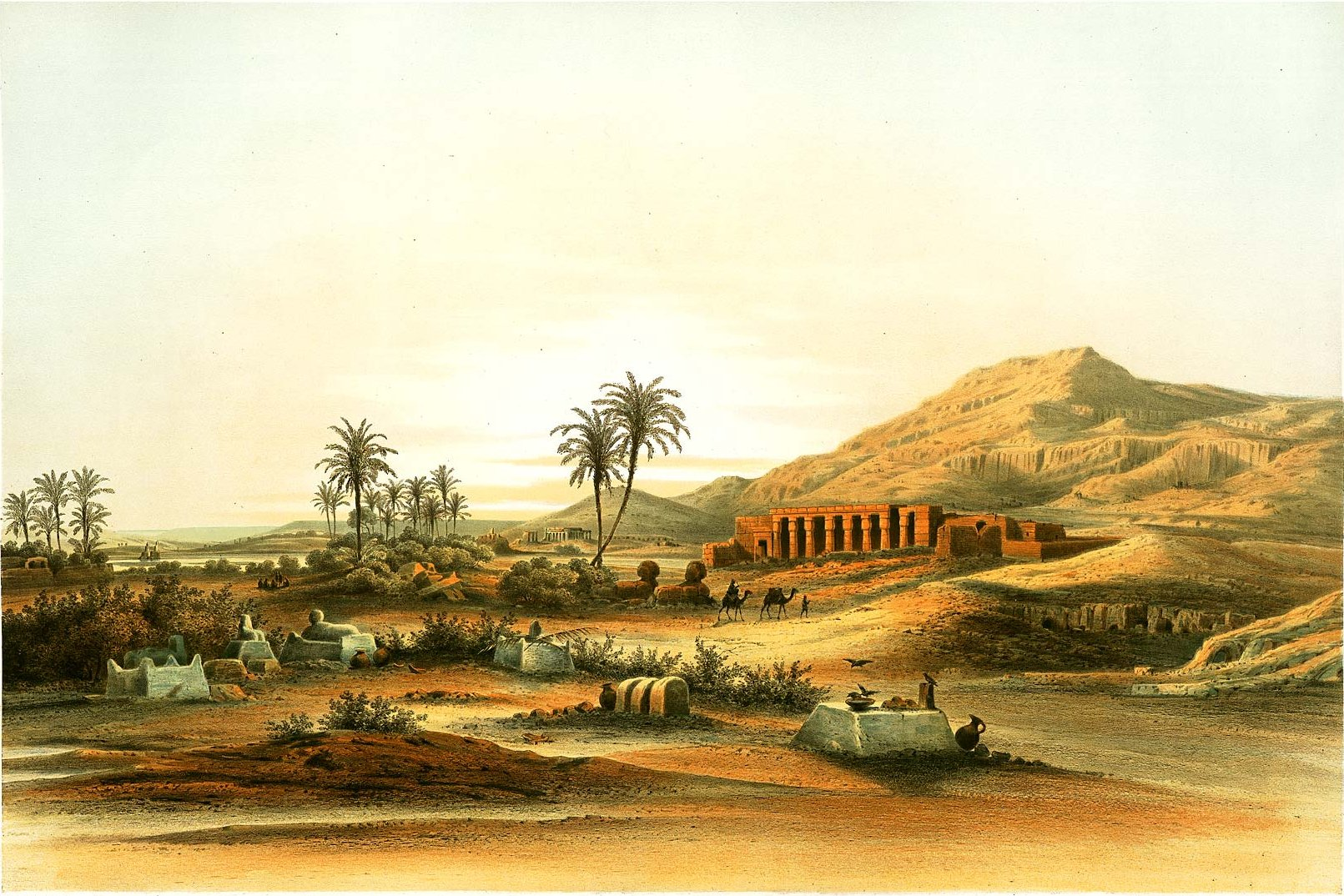 Denkmaeler aus Aegypten und Aethiopien nach den Zeichnungen der von Seiner Majestät dem Koenige von Preussen, Friedrich Wilhelm IV., nach diesen Ländern gesendeten, und in den Jahren 1842–1845 ausgeführten wissenschaftlichen Expedition auf Befehl Seiner Majestät